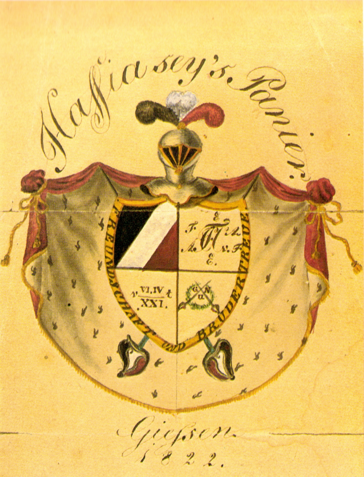 Mantelwappen des Corps Hassia Gießen (heute in Mainz) aus dem Jahr 1822. Aus der Sammlung Dr. Langhans in den Sammlungsbeständen des Kösener Archivs im Institut für Hochschulkunde an der Universität Würzburg